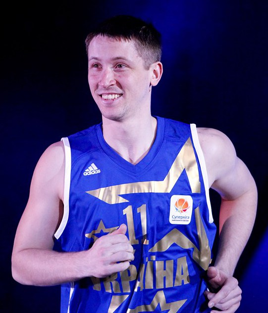 Матч всех звезд баскетбольной Суперлиги 2012. Киев.